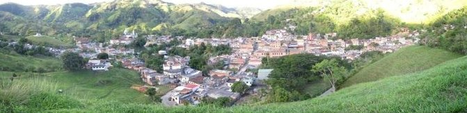 Panorámica de Caracoli, Antioquia